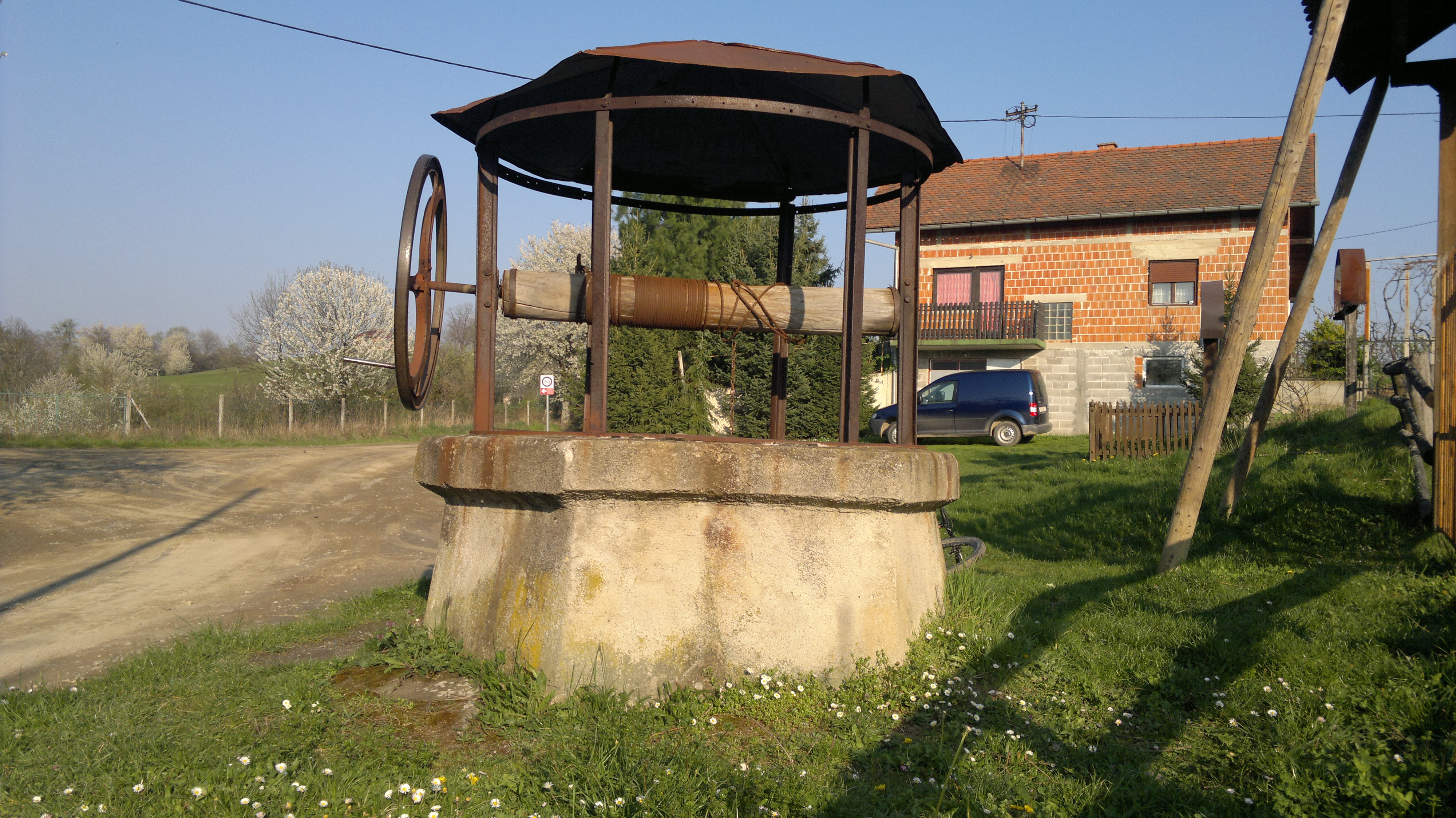 34000, Vasine Laze, Croatia